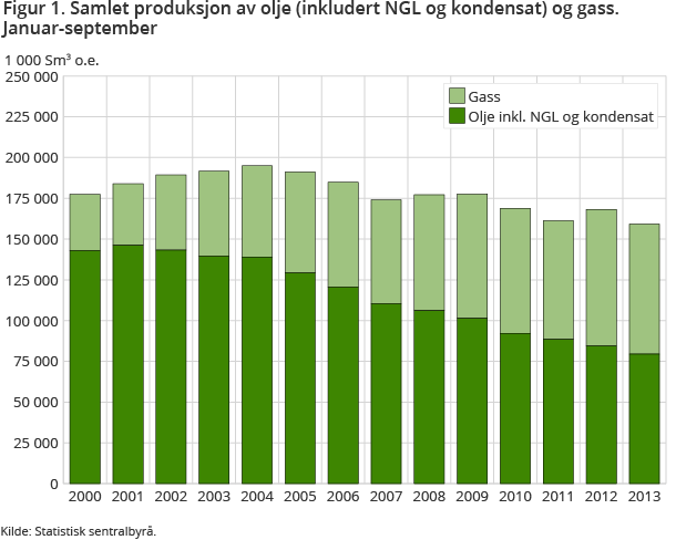 Statistisk sentralbyrå.